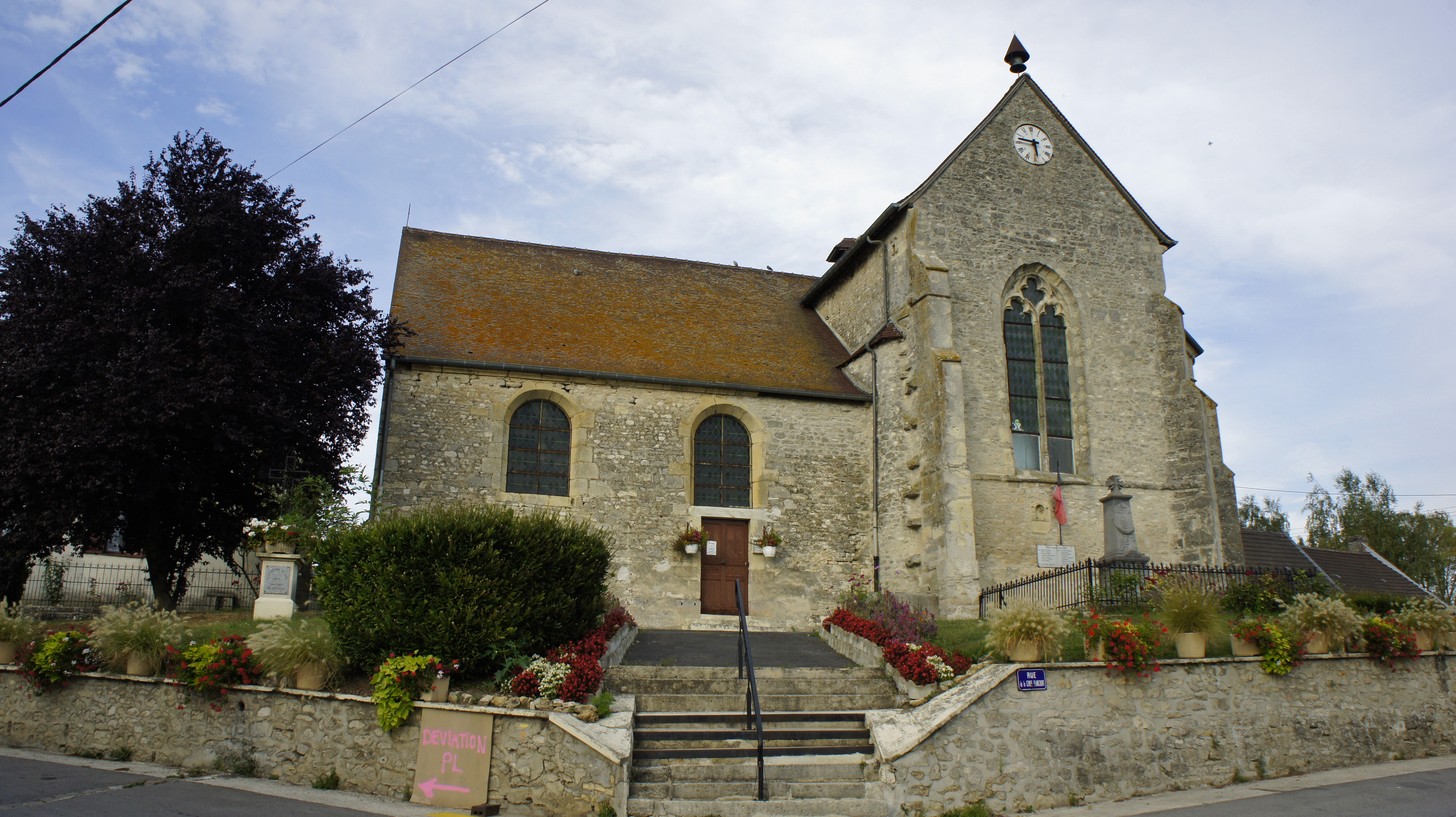 Une vue montrant tan l'église que le monument aux morts en la ville.